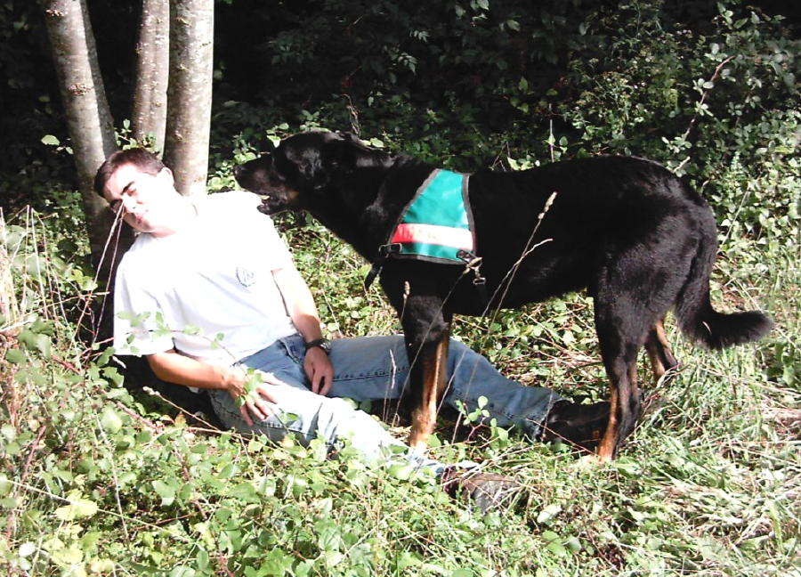 M.Théo Foxy des Roches Vaillantes, Berger de Beauce de recherche de personnes égarées de l'ECERPE, a trouvé la victime et aboie pour avertir sa maîtresse.